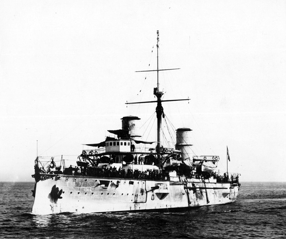 ARA General Pueyrredon